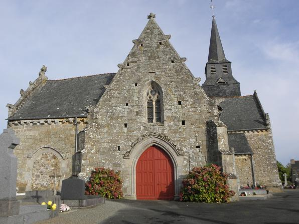 Eglise St-Léon de La Baussaine (35)